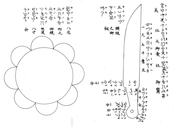 美しの杜神字録に記された大御食神社御宝